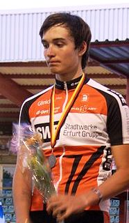 Rick Zabel, 2. im Zweier-Mannschaftsfahren Junioren Bahn-DM 2010 in Cottbus